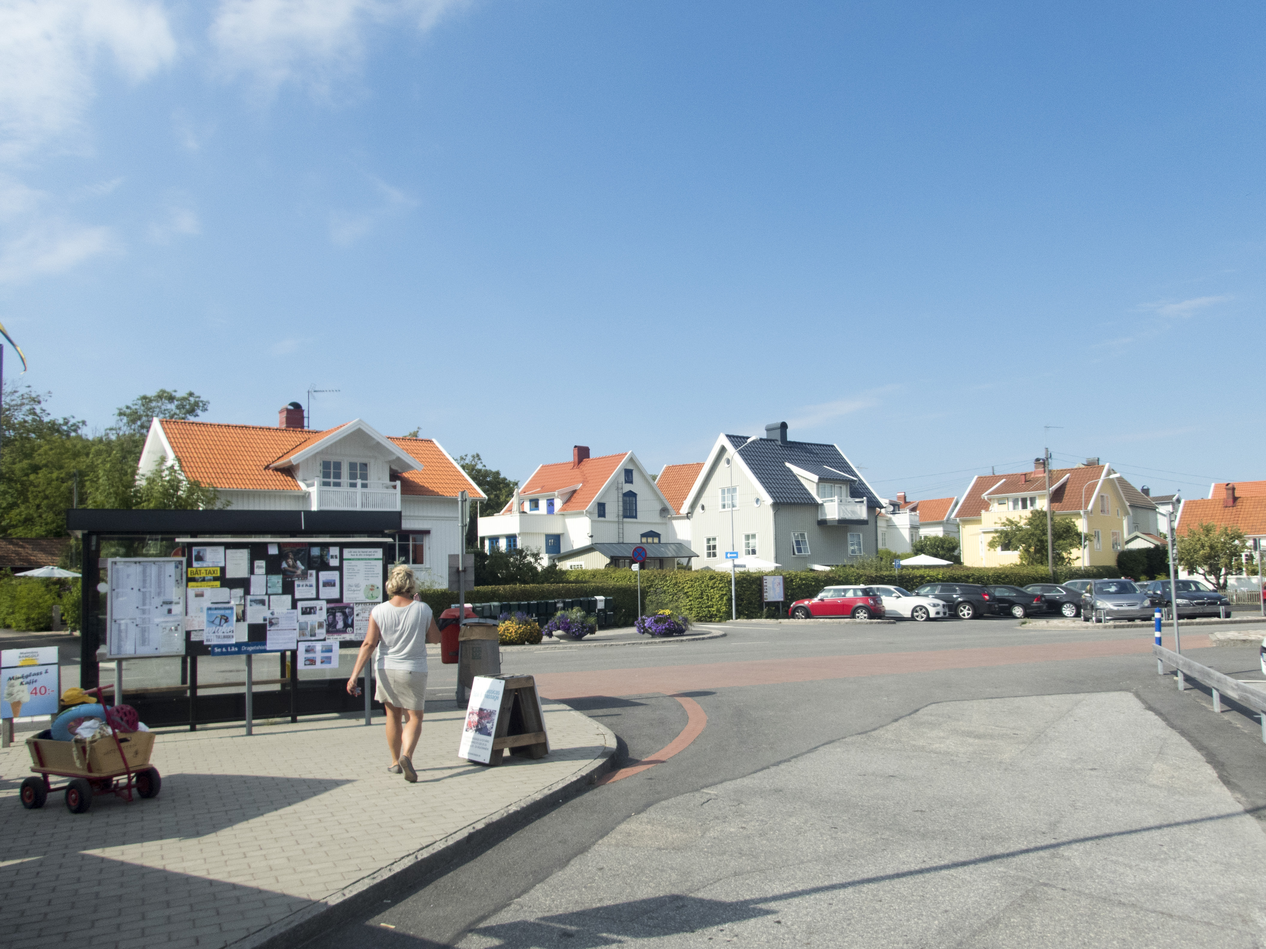 Malmön